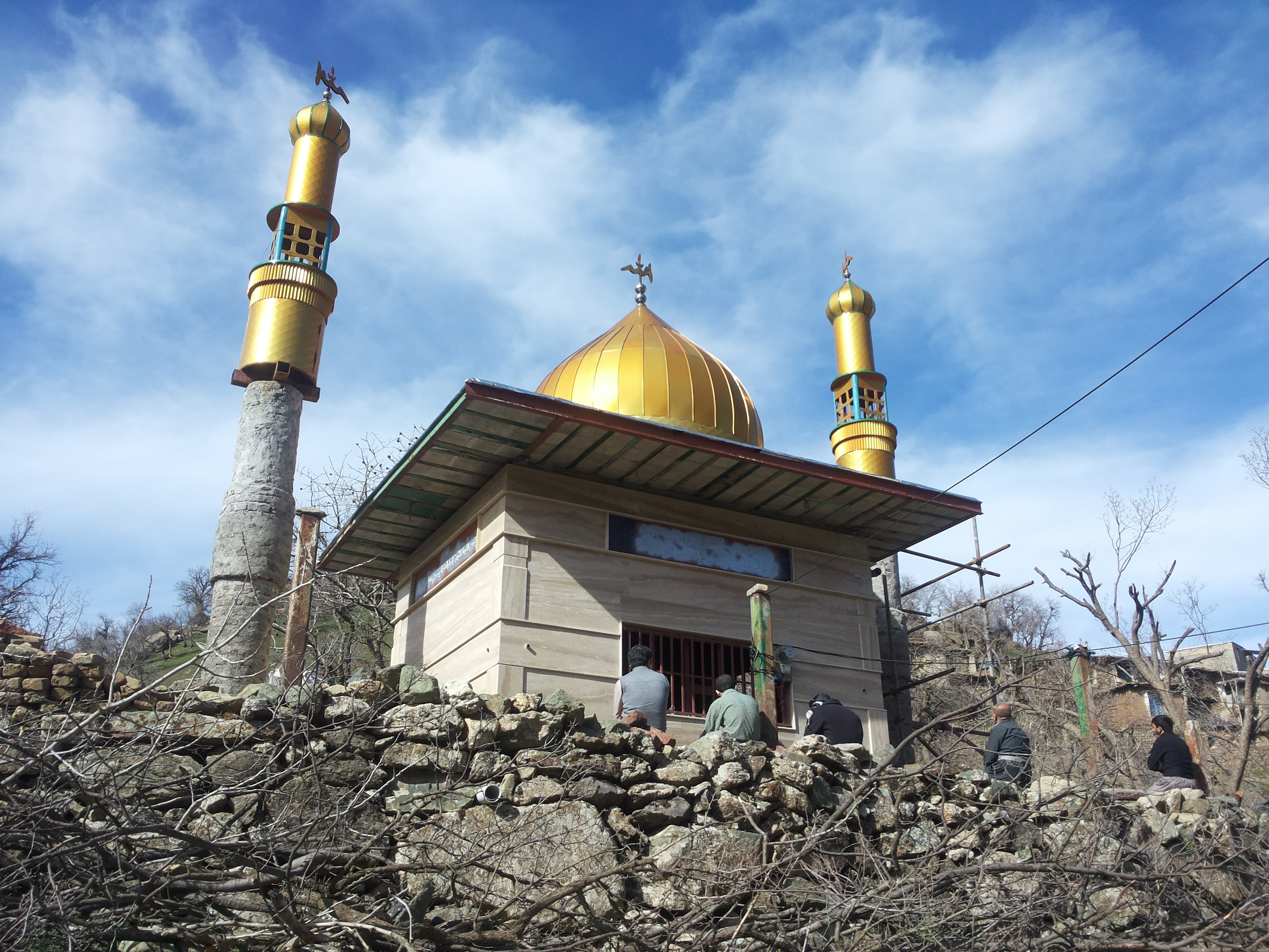 کوردی: وێنەیەک لە مەزارەکەی پیریۆنس